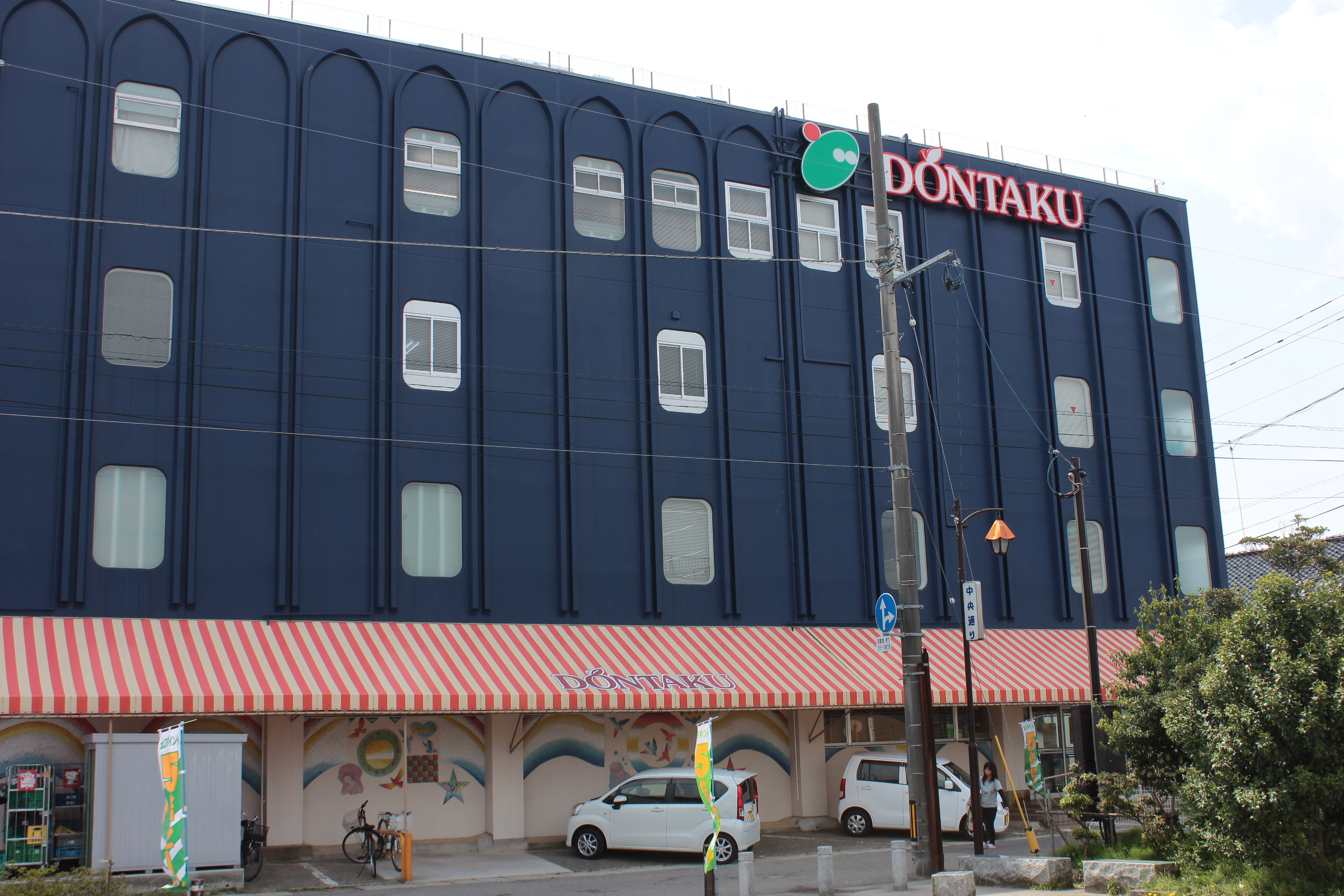 石川県七尾市にあるスーパーマーケット「どんたく」を運営する山成商事本社、ならびにどんたく新鮮館（1階） Canon EOS Kiss X5